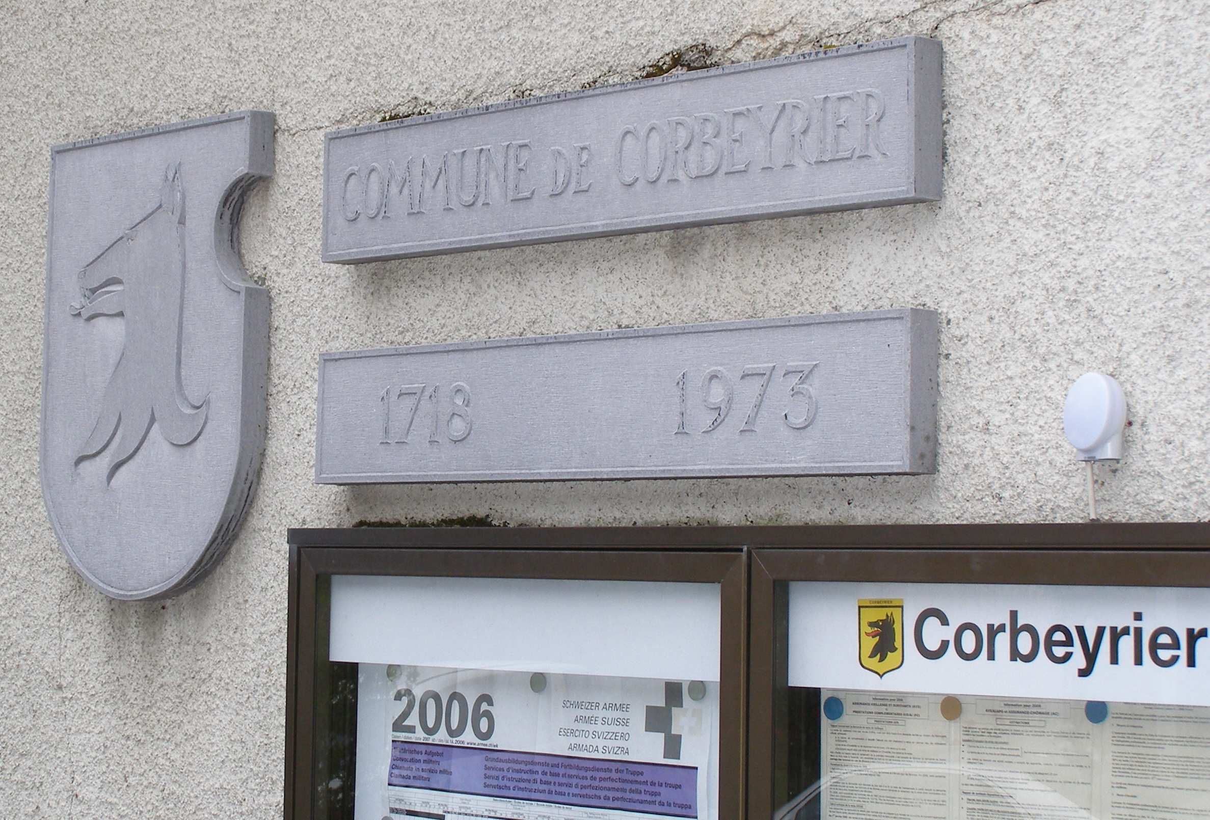 Commune sign for Corbeyrier, Vaud, Switzerland. Taken by Storkk.